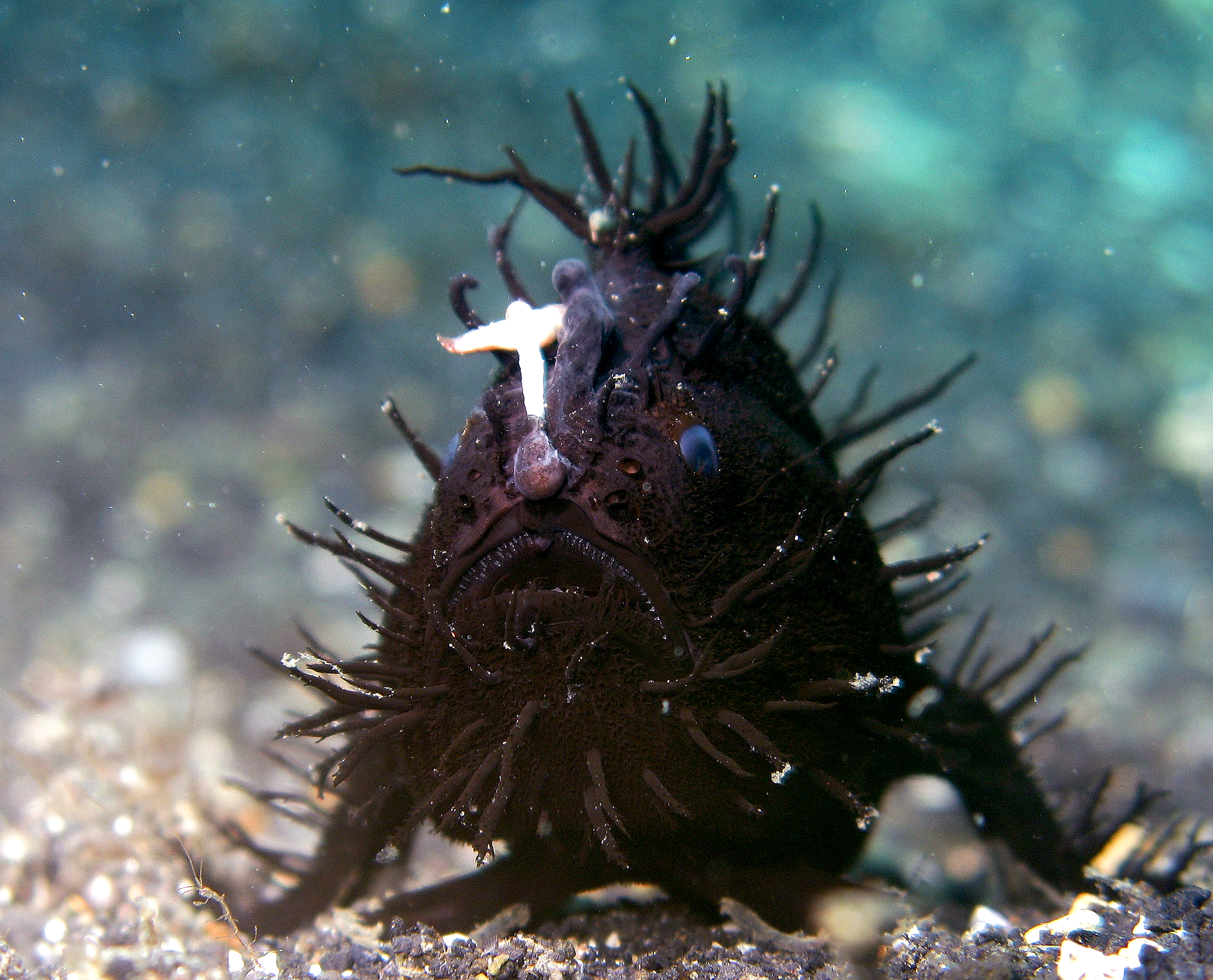 Antennarius striatus